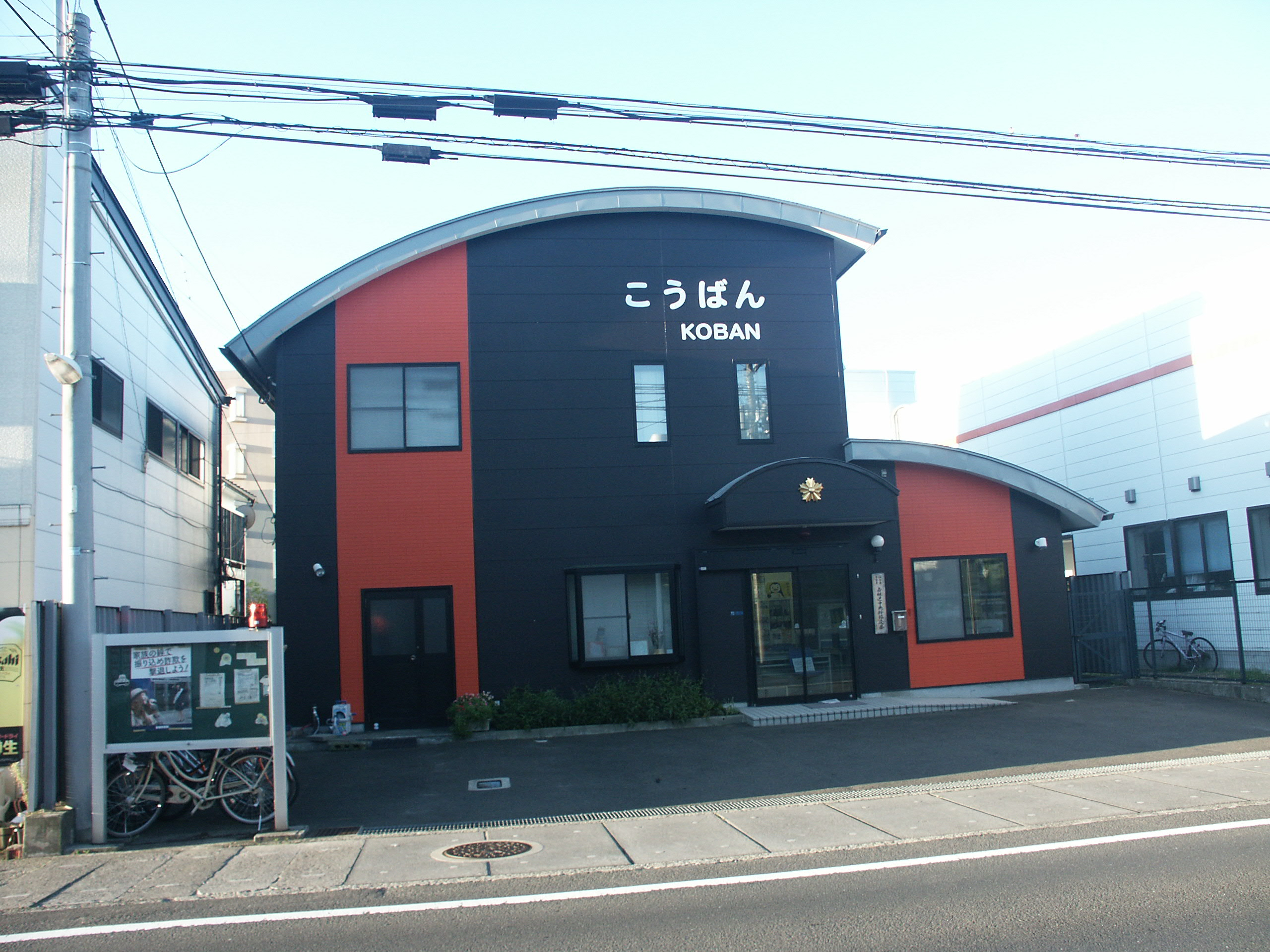 仙台南警察署若林区中央幹部交番